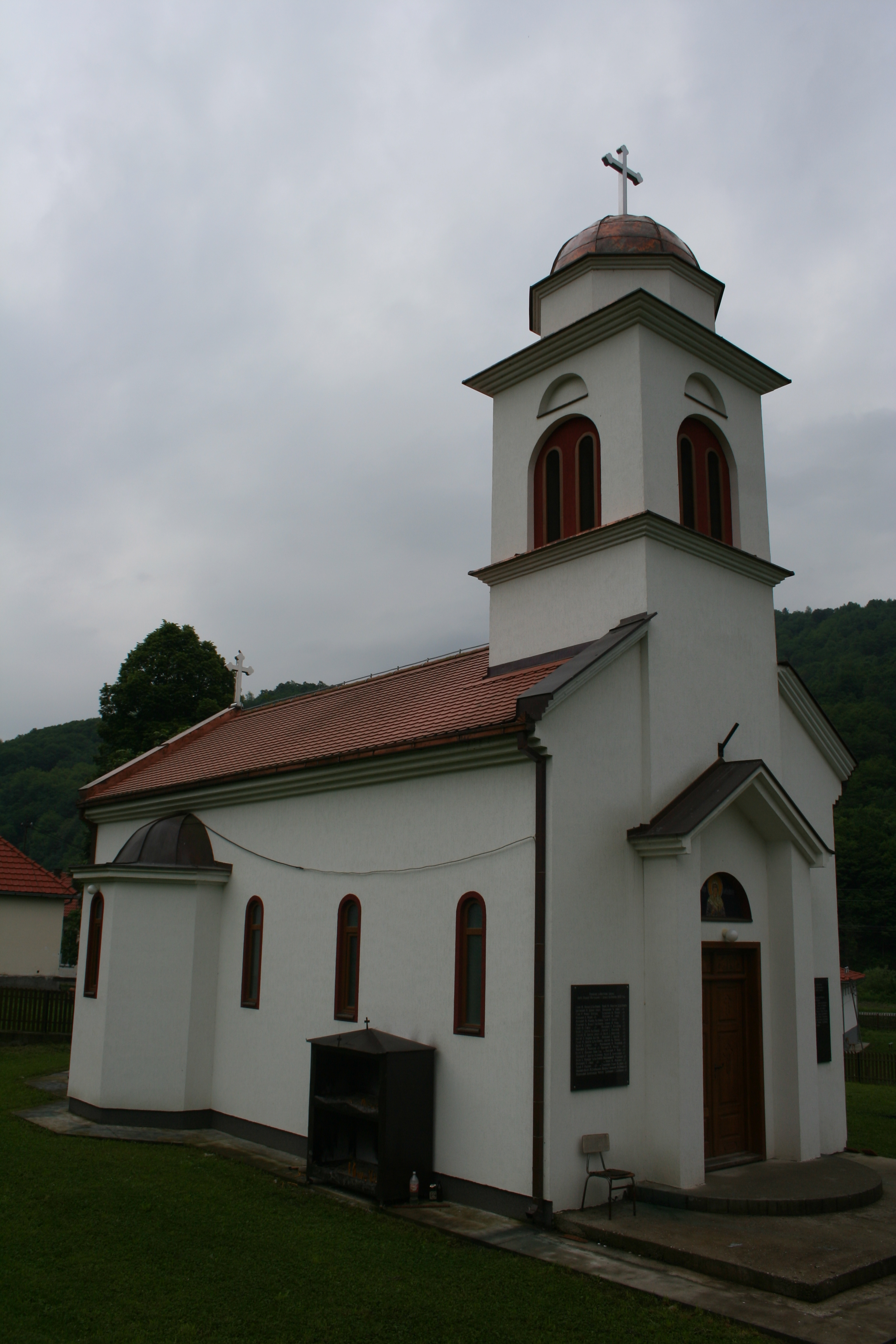 Crkva Sv. Marije Magdaline, Donja Ljuboviđa